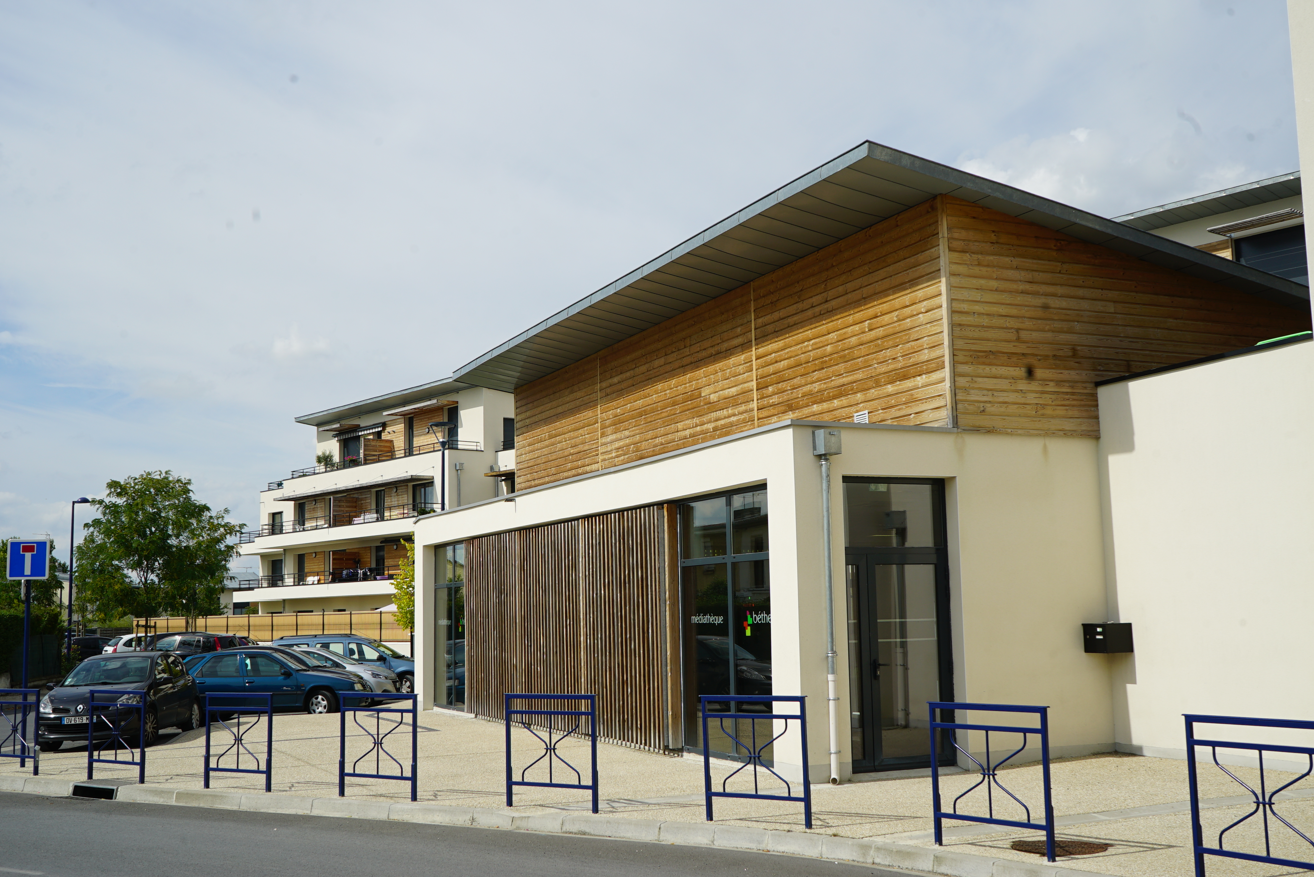 de la ville de Bétheny.